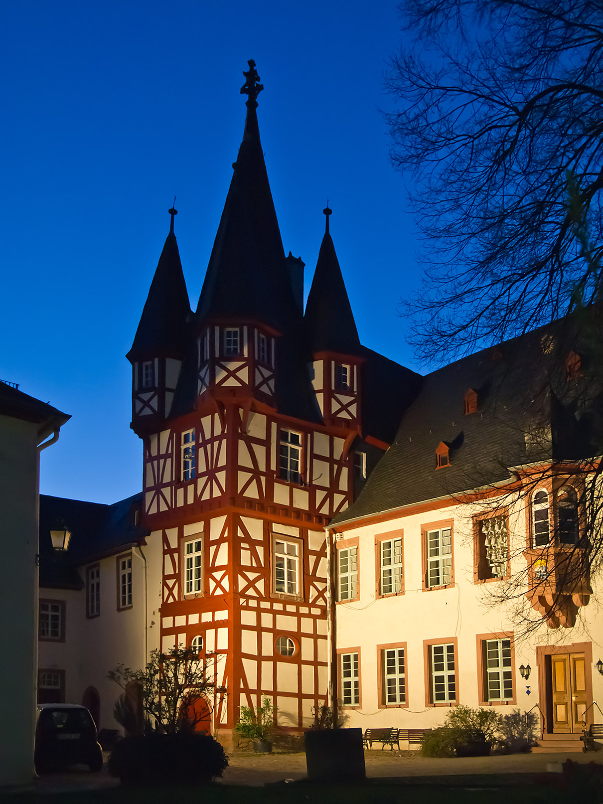 Brömserhof in Rüdesheim am Rhein mit Siegfried´s Mechanischem Musikkabinett, Oberstraße 29 (O4012881-vh)